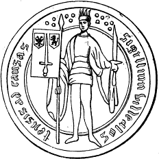 Het Stadszegel van Aalst ("grooten zeghele vander poort") uit 1394 met omschrift: "Sigillum ville Alostensis ad causas"